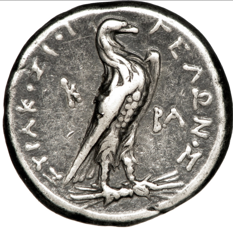 ritaglio di